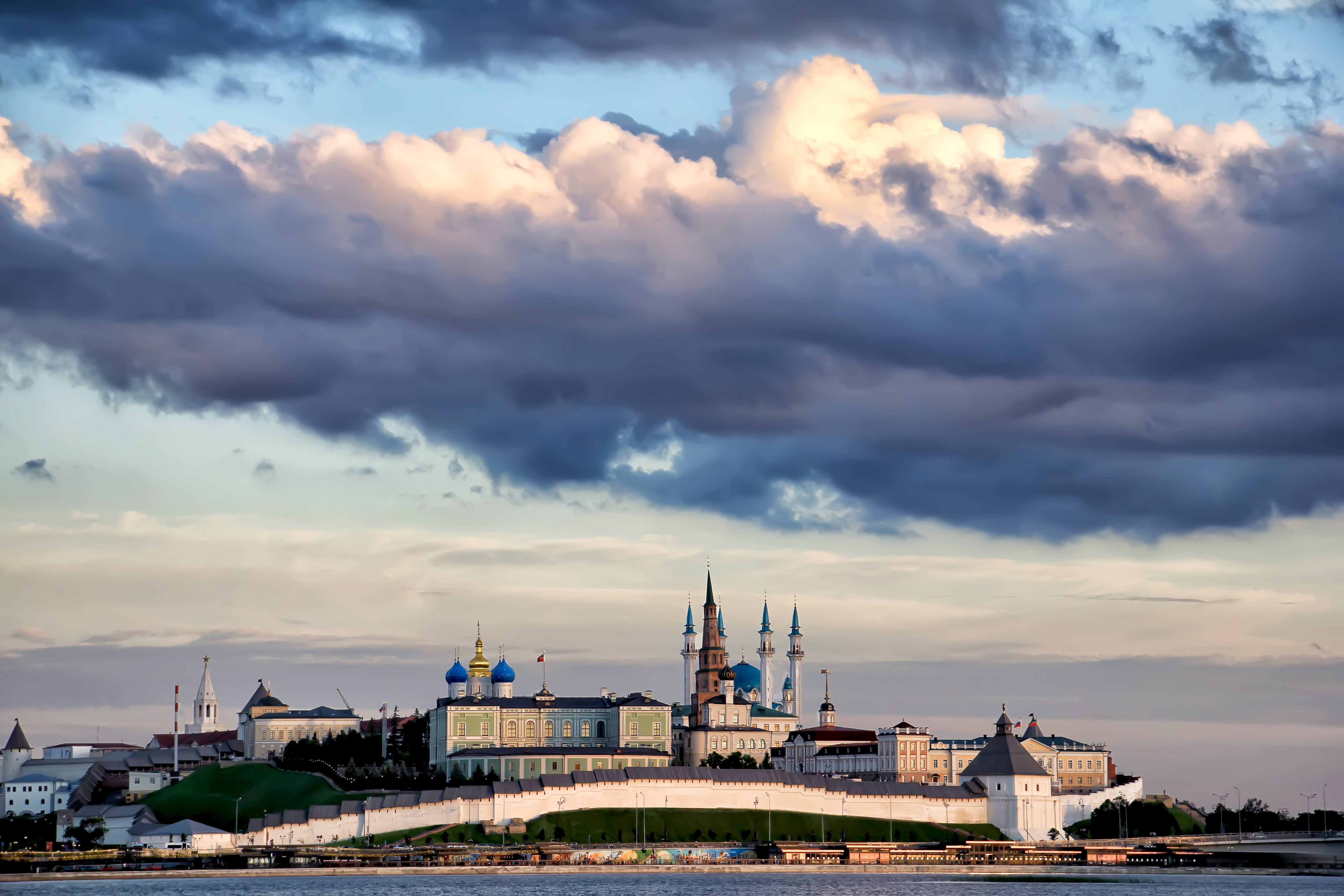 Ансамбль Казанского Кремля (Государственный историко-архитектурный и художественный музей-заповедник Казанский Кремль): Кремль, Казань, Татарстан